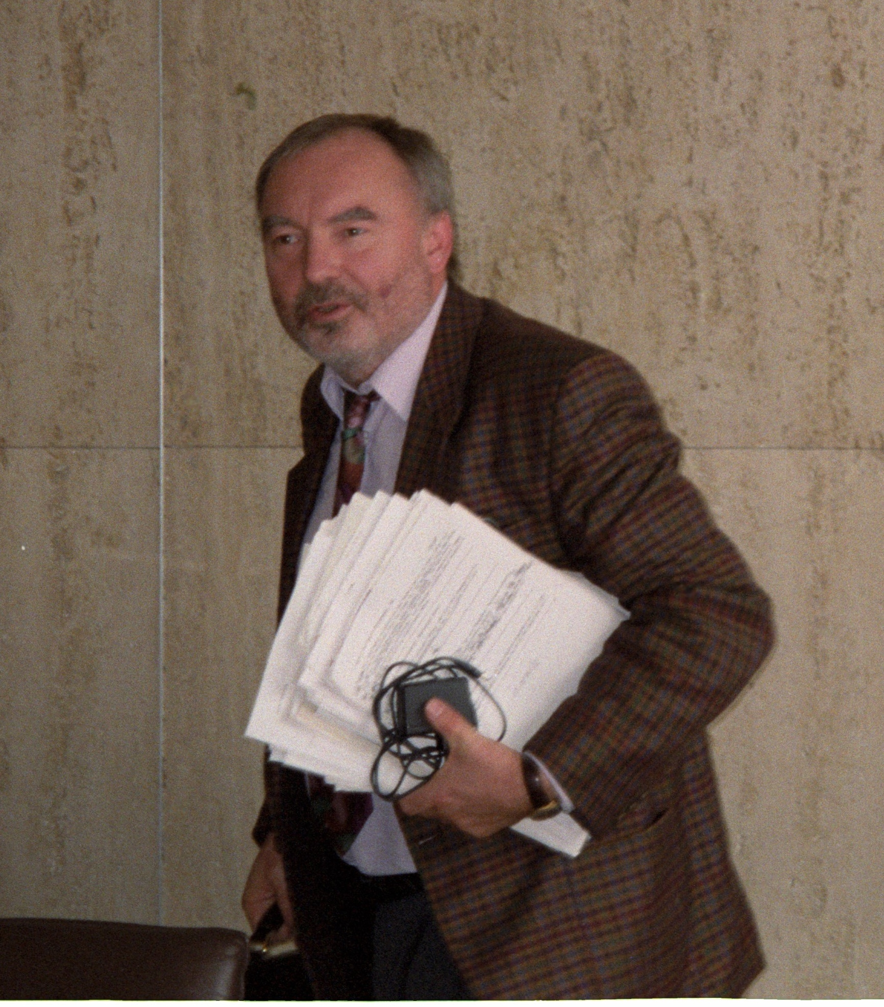 Lutz Freitag, Gewerkschaftsfunktionär